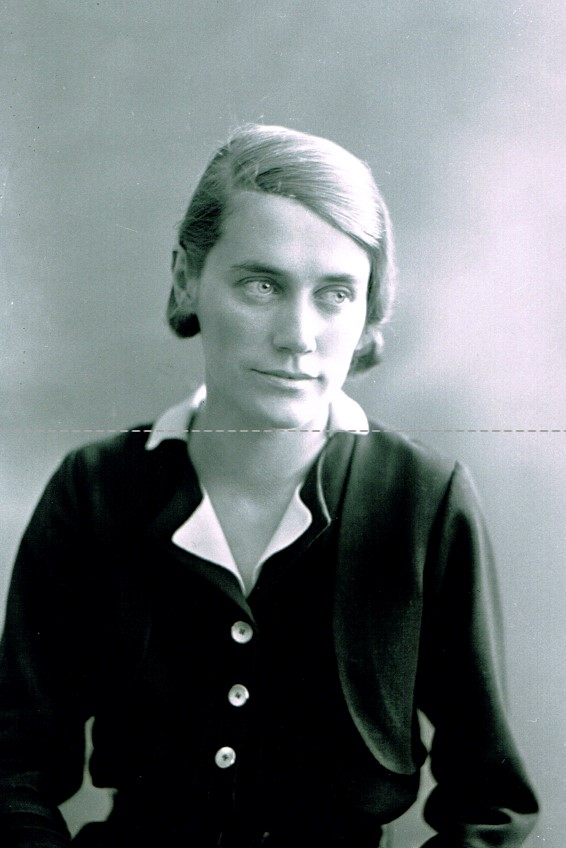 Porträttfotografi av Elisabeth Tykesson